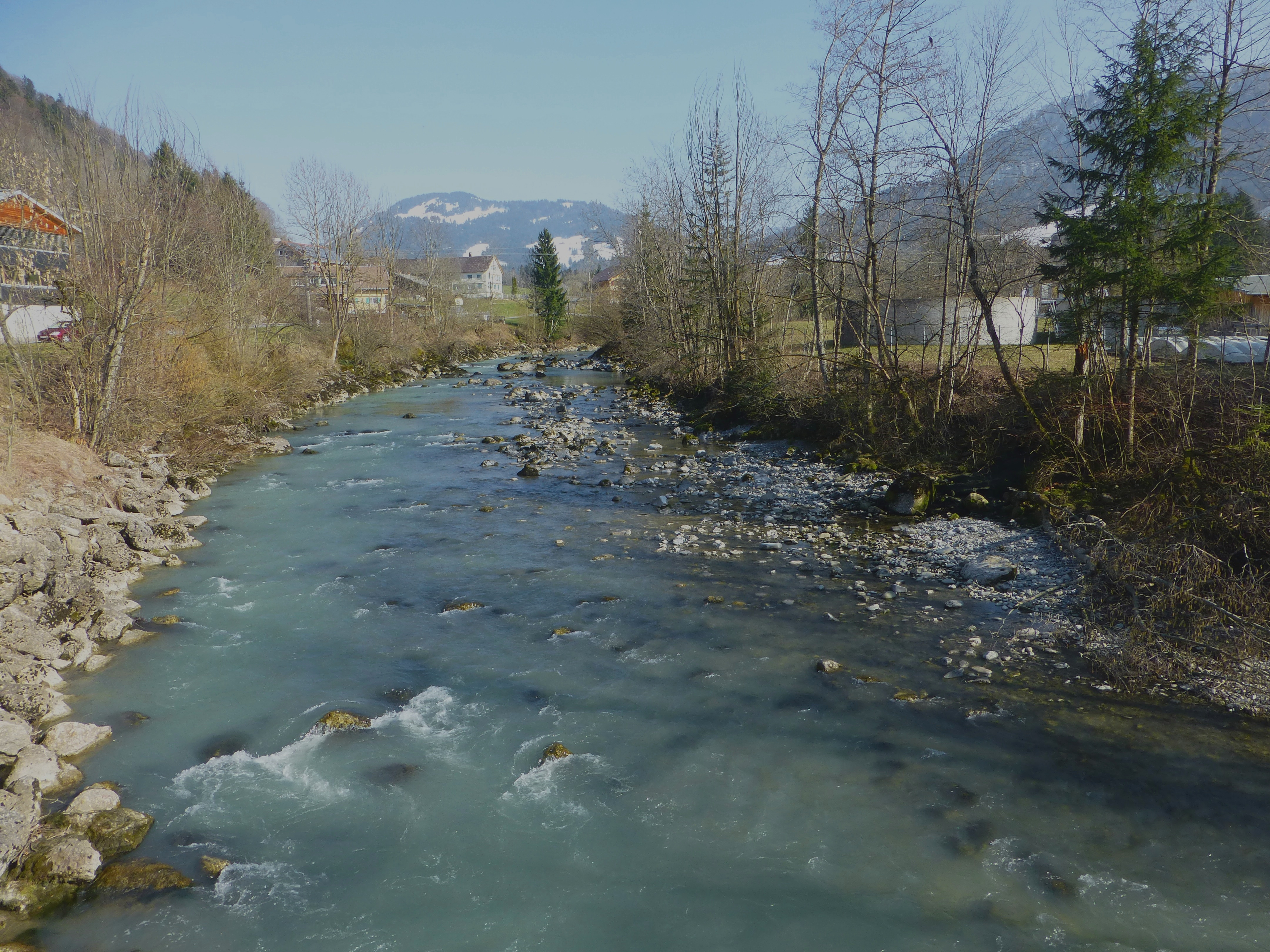 Die Bolgenach bei Hittisau.